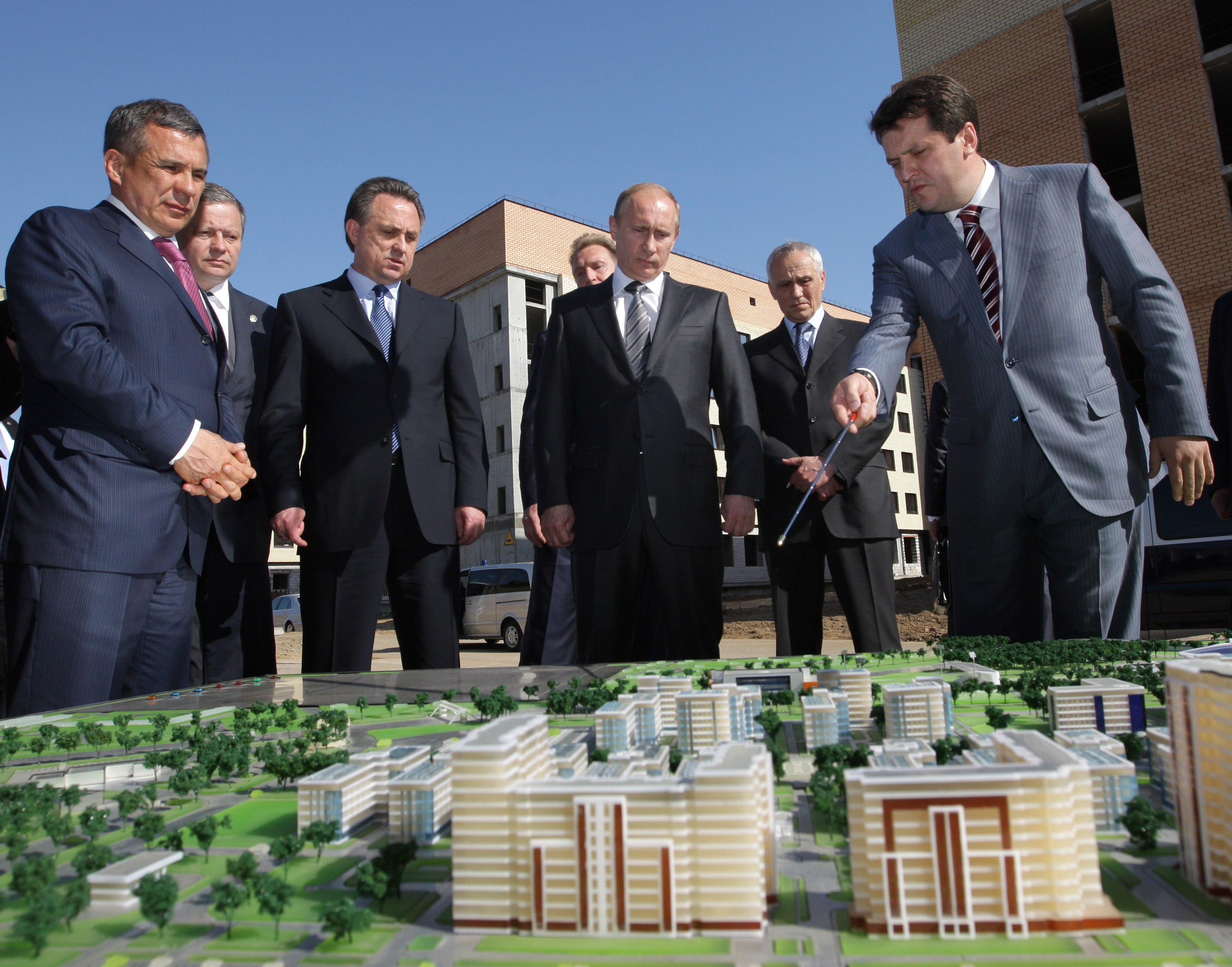 Председатель Правительства Российской Федерации В. В. Путин и Президент Республики Татарстан Р. Н. Минниханов инспектируют ход строительства Деревни Универсиады в Казани.